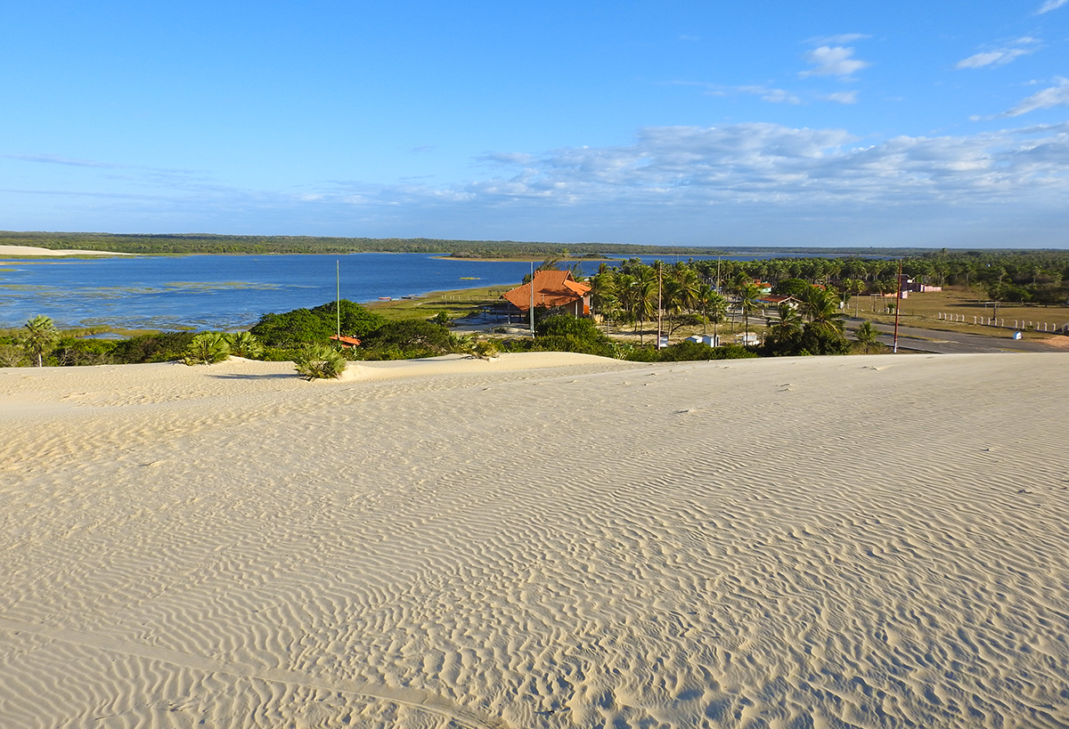 Lagoa do Portinho é um ponto turístico da cidade de Parnaíba.